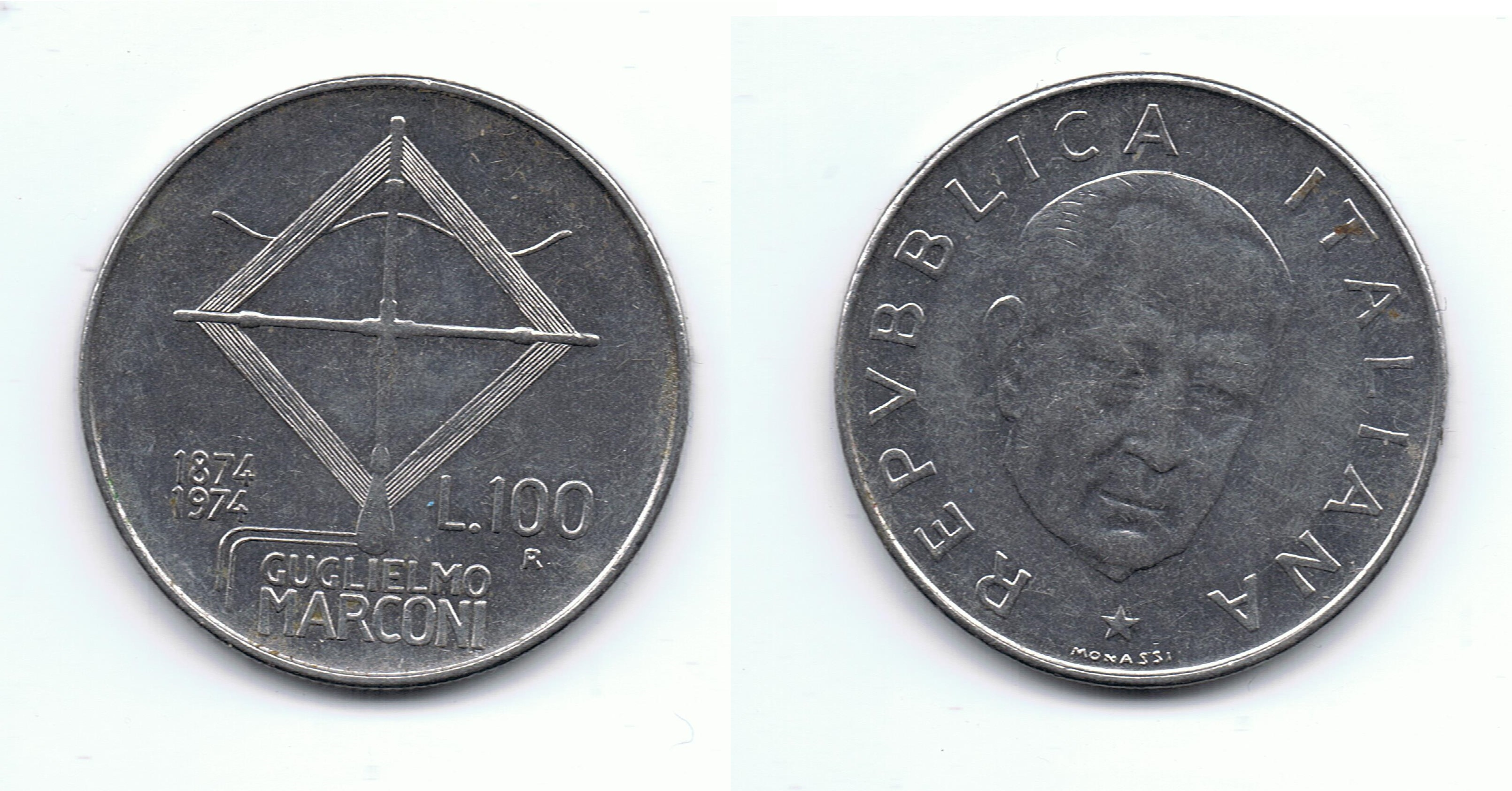 100 Lire Italiane - Centenario di Guglielmo Marconi